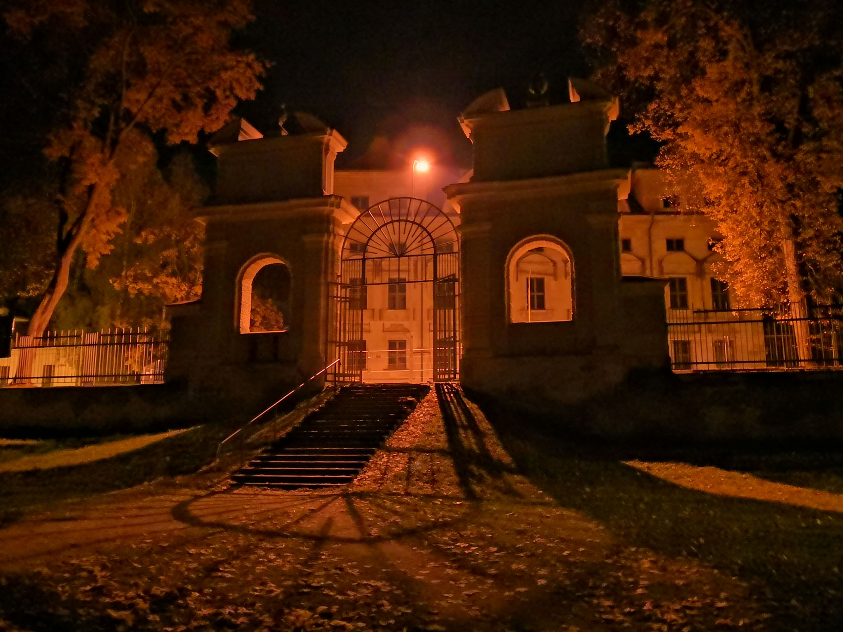 Sapiegų parko vartai iš parko pusės, priešais Sapiegų rūmus. 2018 m. ruduo. G. Kulikausko fotografija.